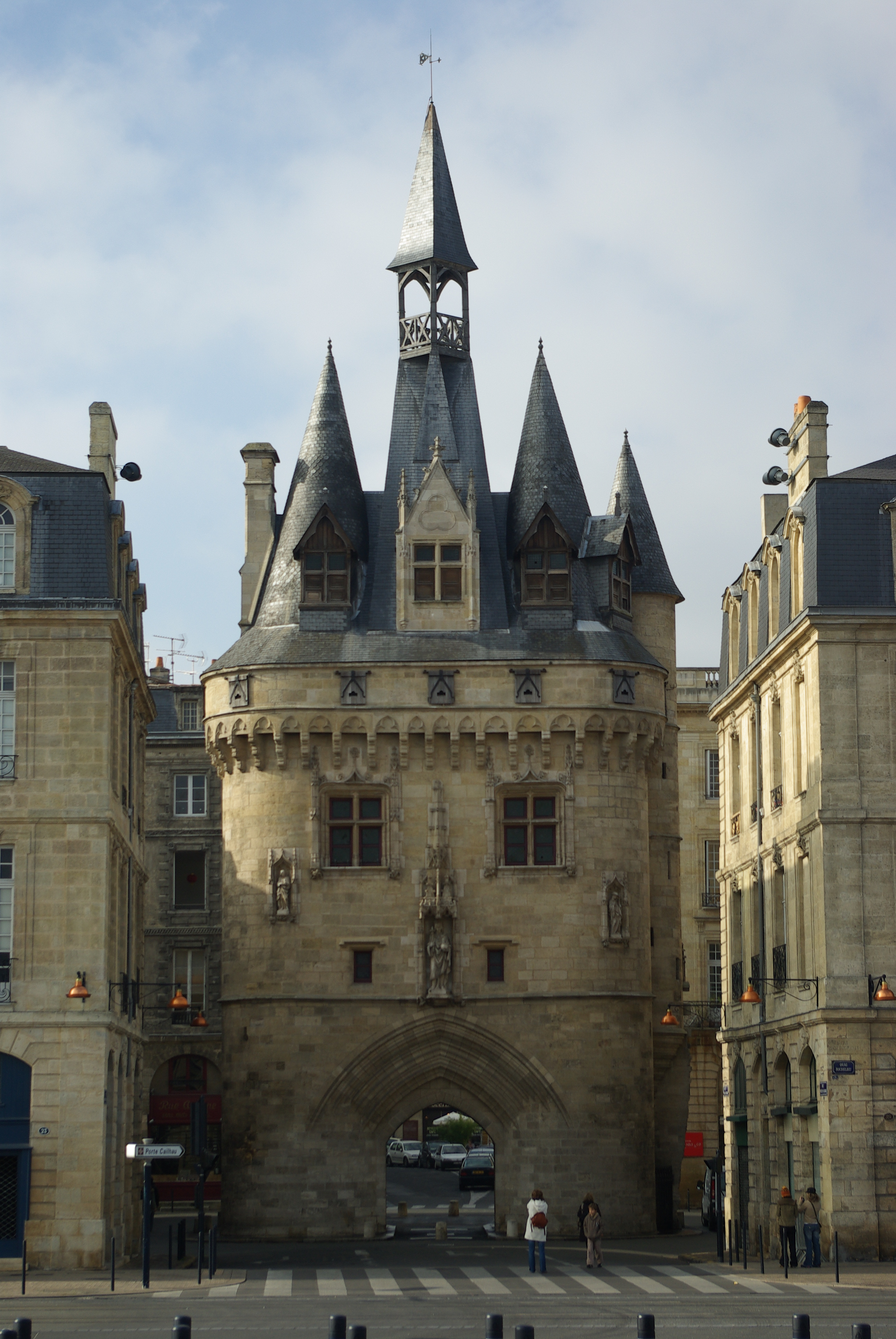 Porte Cailhau, Bordeaux, France